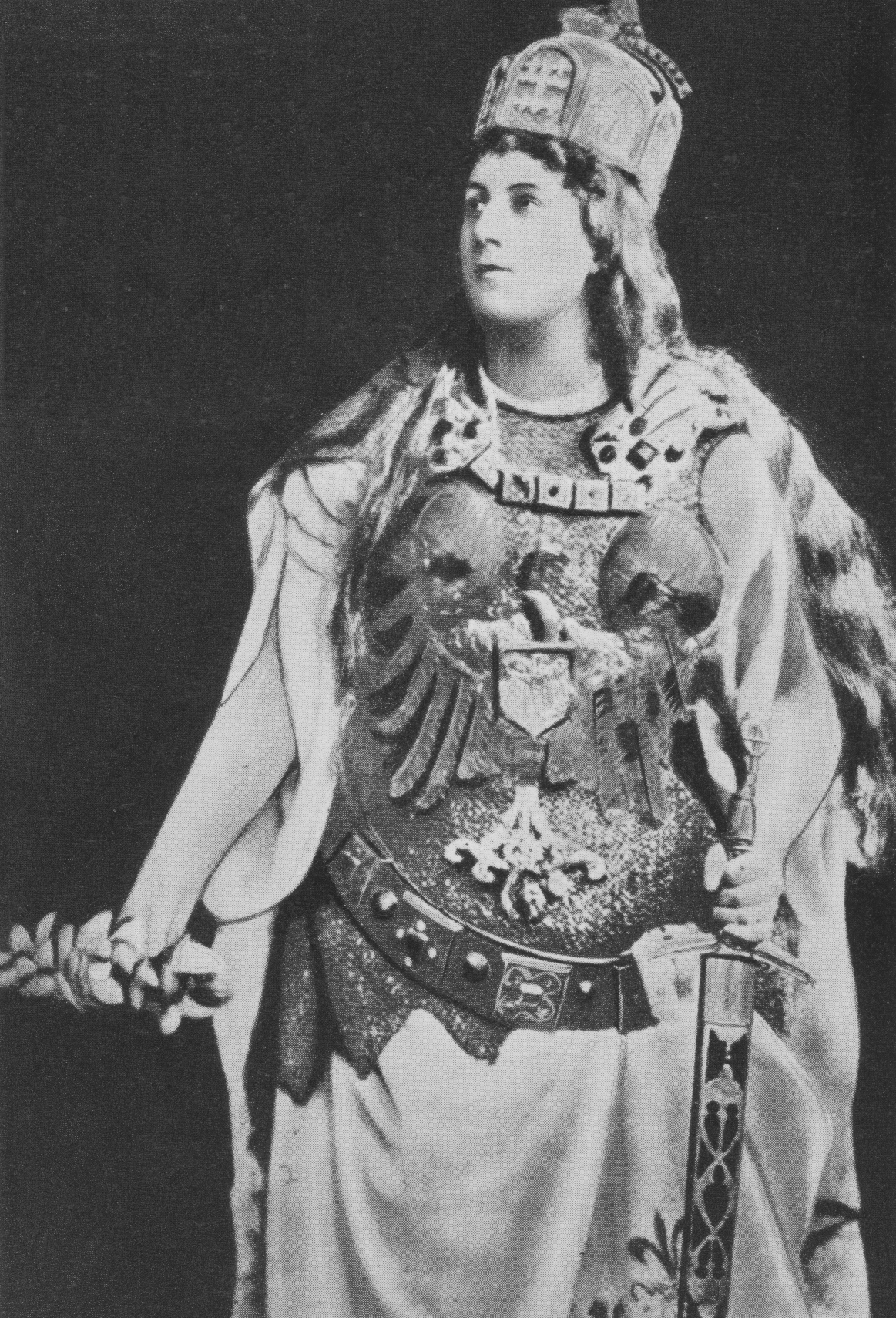 Die deutsche Schauspielerin Anna Führing (1866-1929) im Kostüm der Germania.